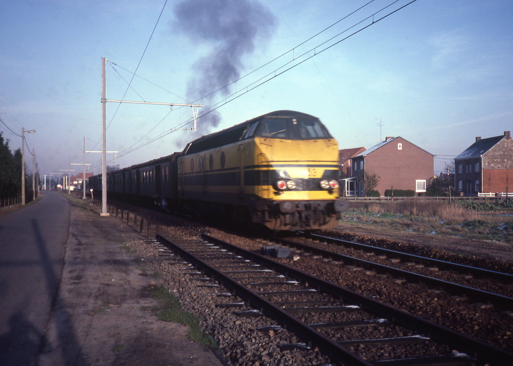 Een dieseltrein rijdend richting Turnhout tijdens de elektrificatie van de spoorlijn.